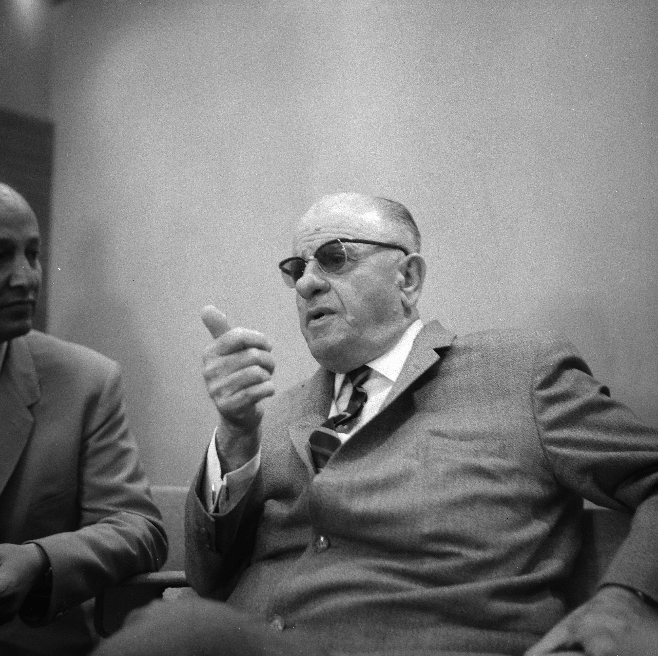 Collectie / Archief : Fotocollectie Anefo Reportage / Serie : [ onbekend ] Beschrijving : Turkse chef Generale staf (Generaal Sunay) Datum : 10 augustus 1964 Locatie : Turkije Trefwoorden : generaals Fotograaf : Broers, F.N. / Anefo Auteursrechthebbende : Nationaal Archief Materiaalsoort : Negatief (zwart/wit) Nummer archiefinventaris : bekijk toegang 2.24.01.03 Bestanddeelnummer : 916-7534